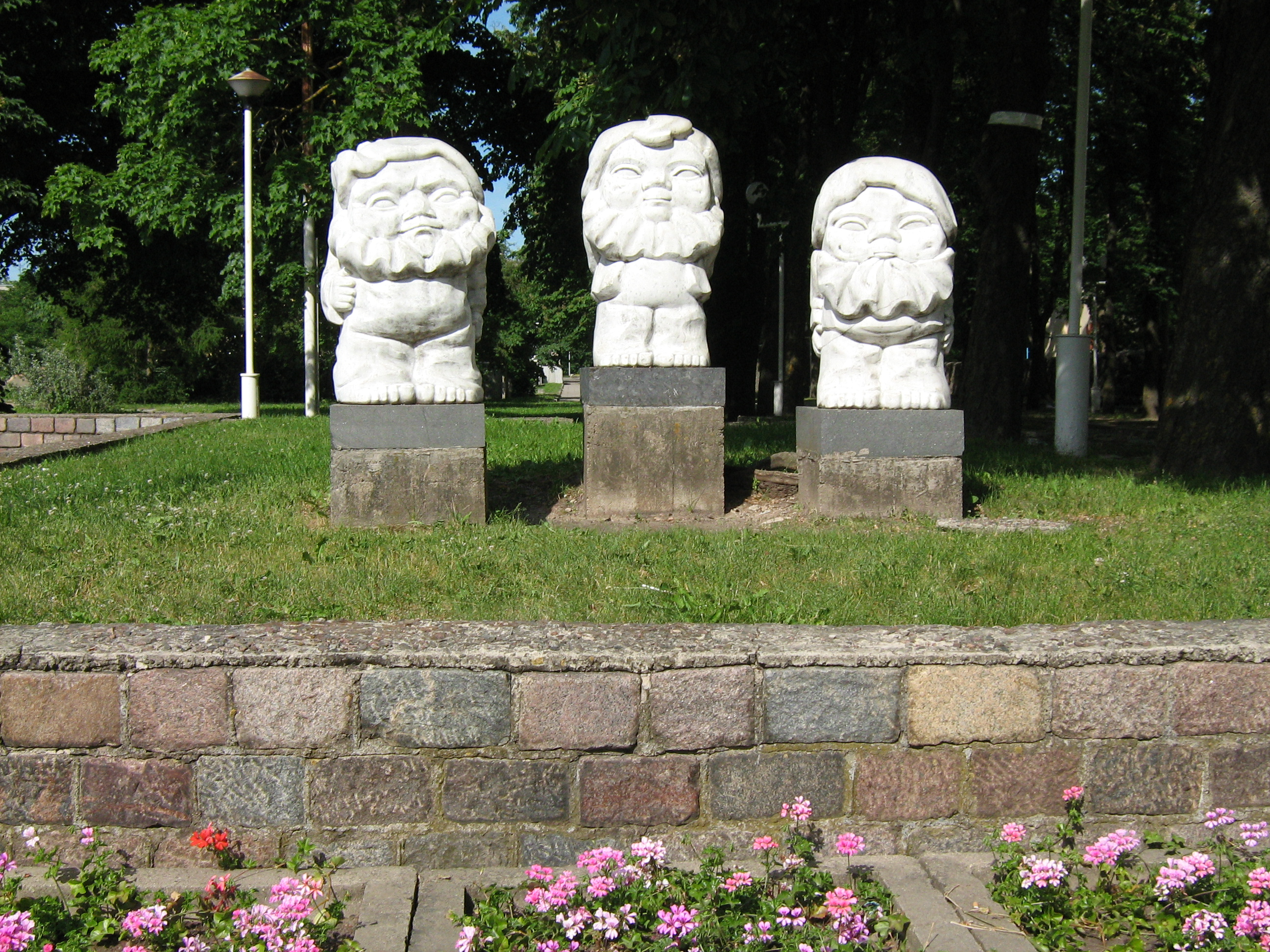 Skulptūra „Trys nykštukai“.